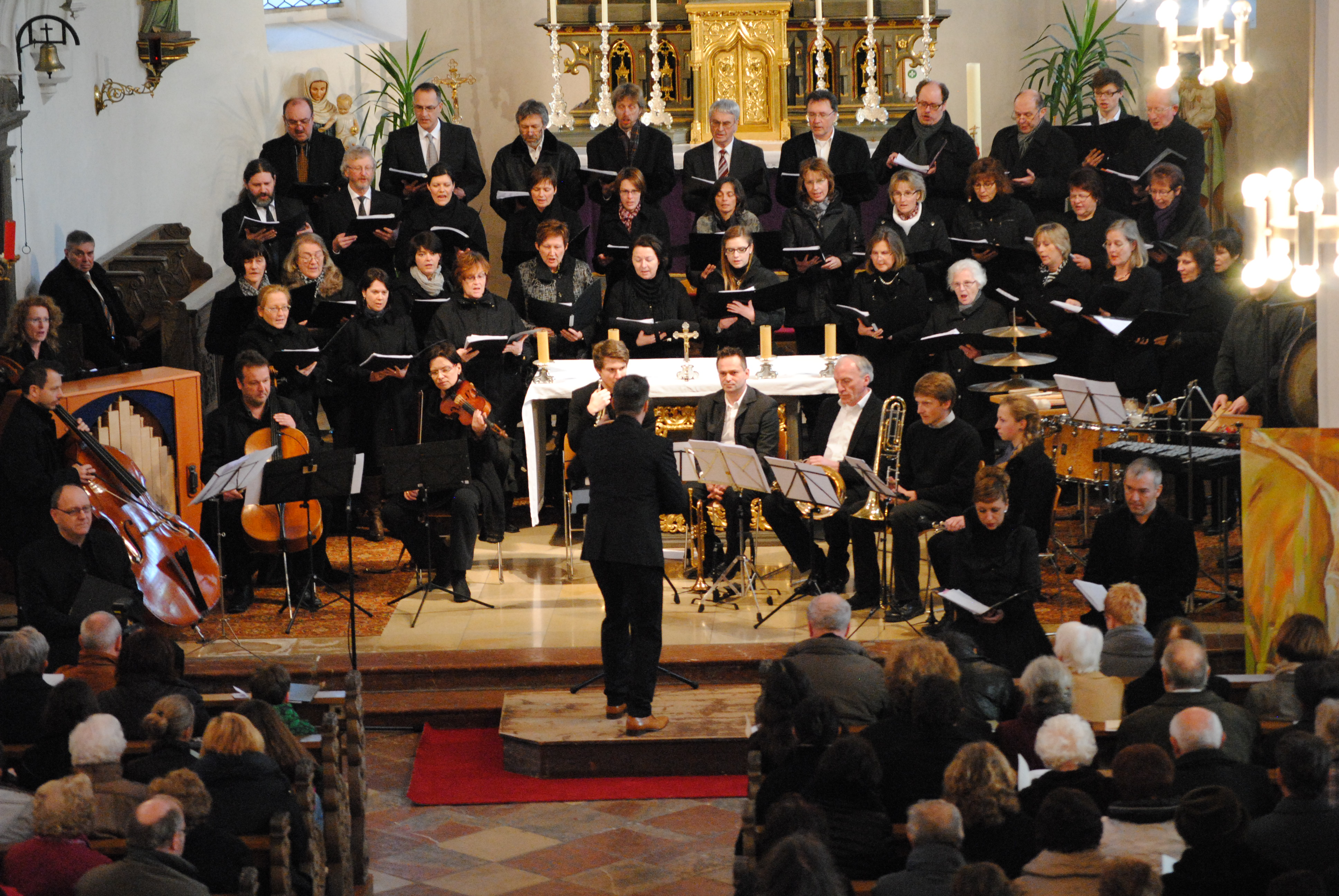 Wörth an der Donau: Wörther Passion